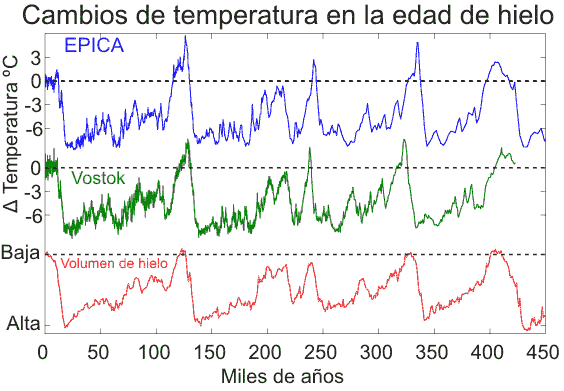 Esquema de las variaciones de temperatura durante la última era glacial.